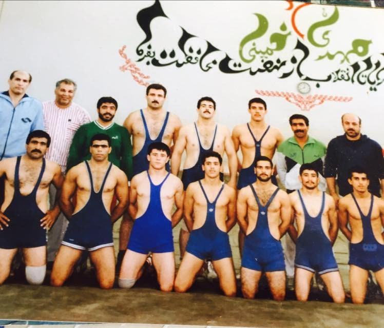 کسب مقام اول در مسابقات 22 بهمن توسط ولی اکبر